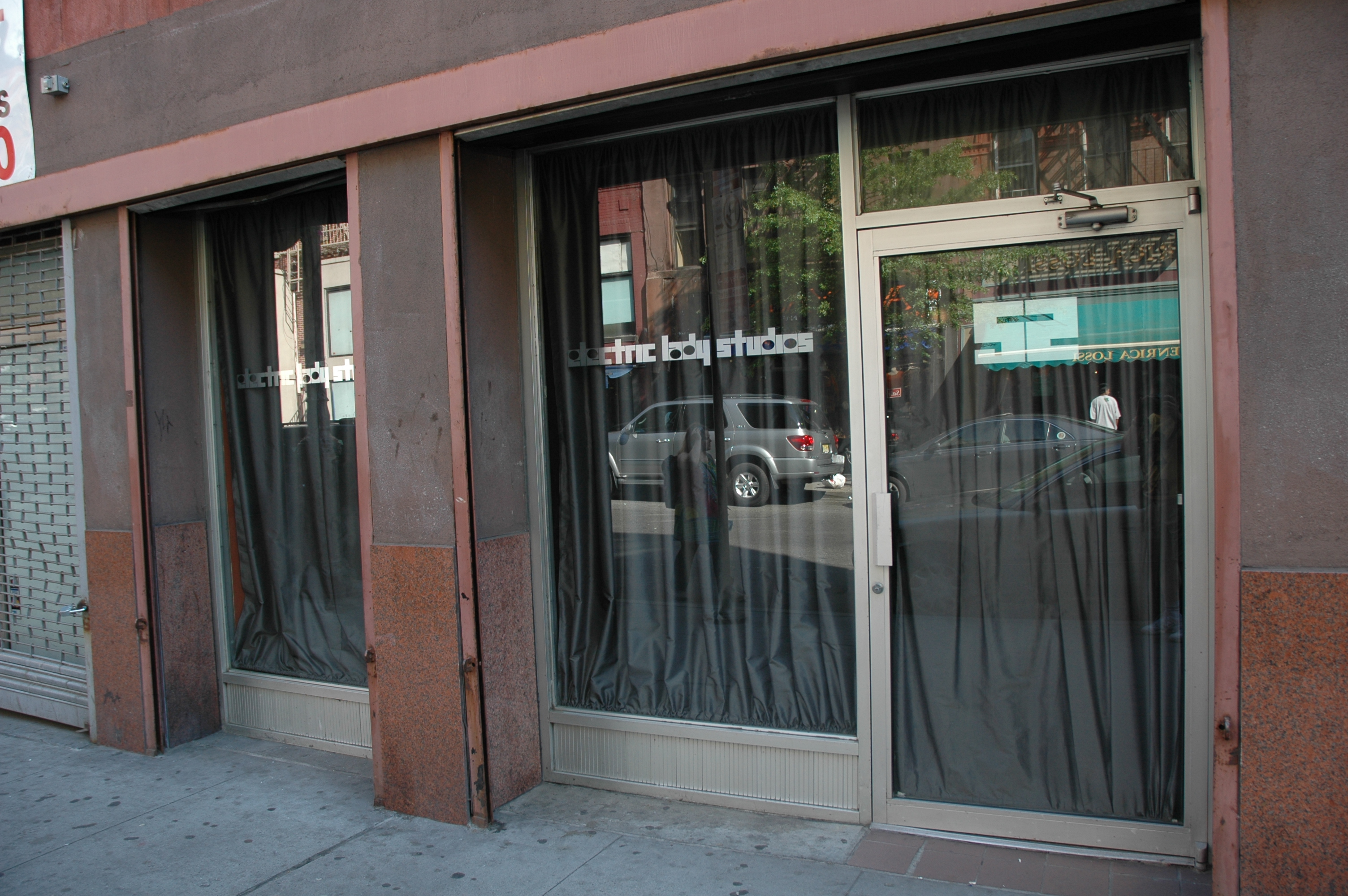 2009 - ElectricLady Studio - New York.